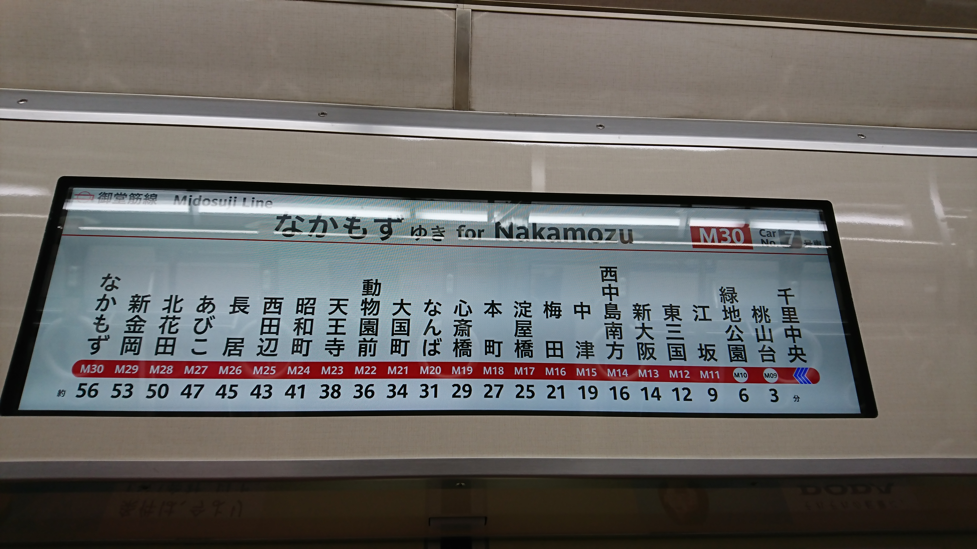 御堂筋線21系21611F 北大阪急行千里中央駅にて